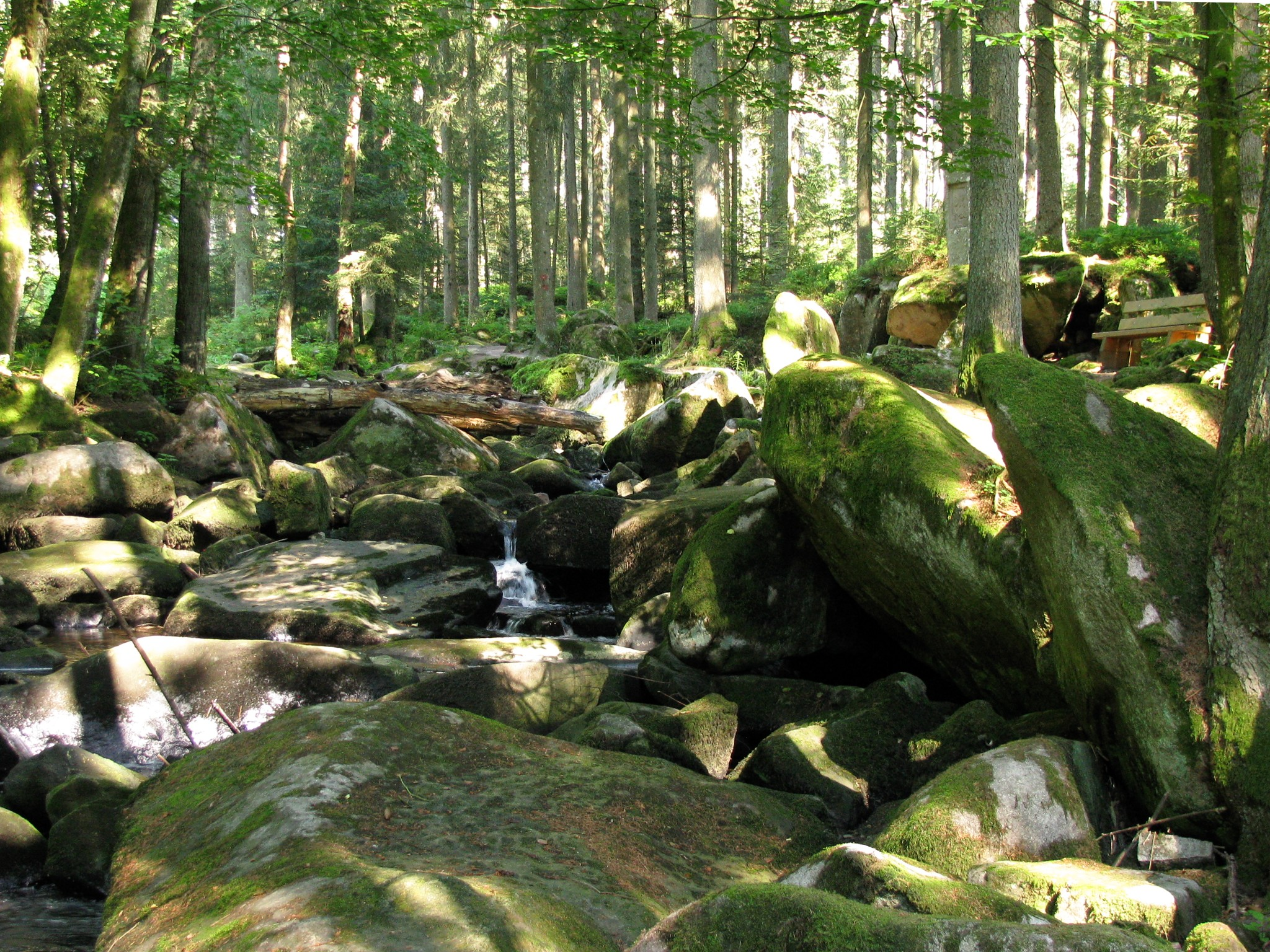 Saußbach im Naturschutzgebiet Saußbachleite